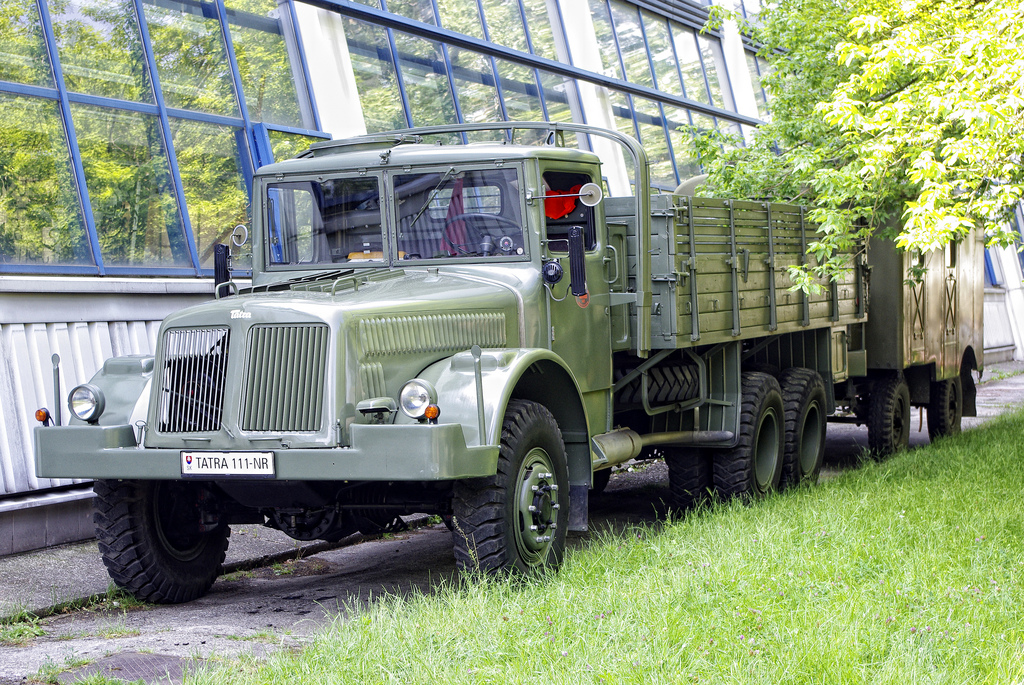 Tatra 111 bei "Auf Rädern und Ketten 2011" im HGM Wien